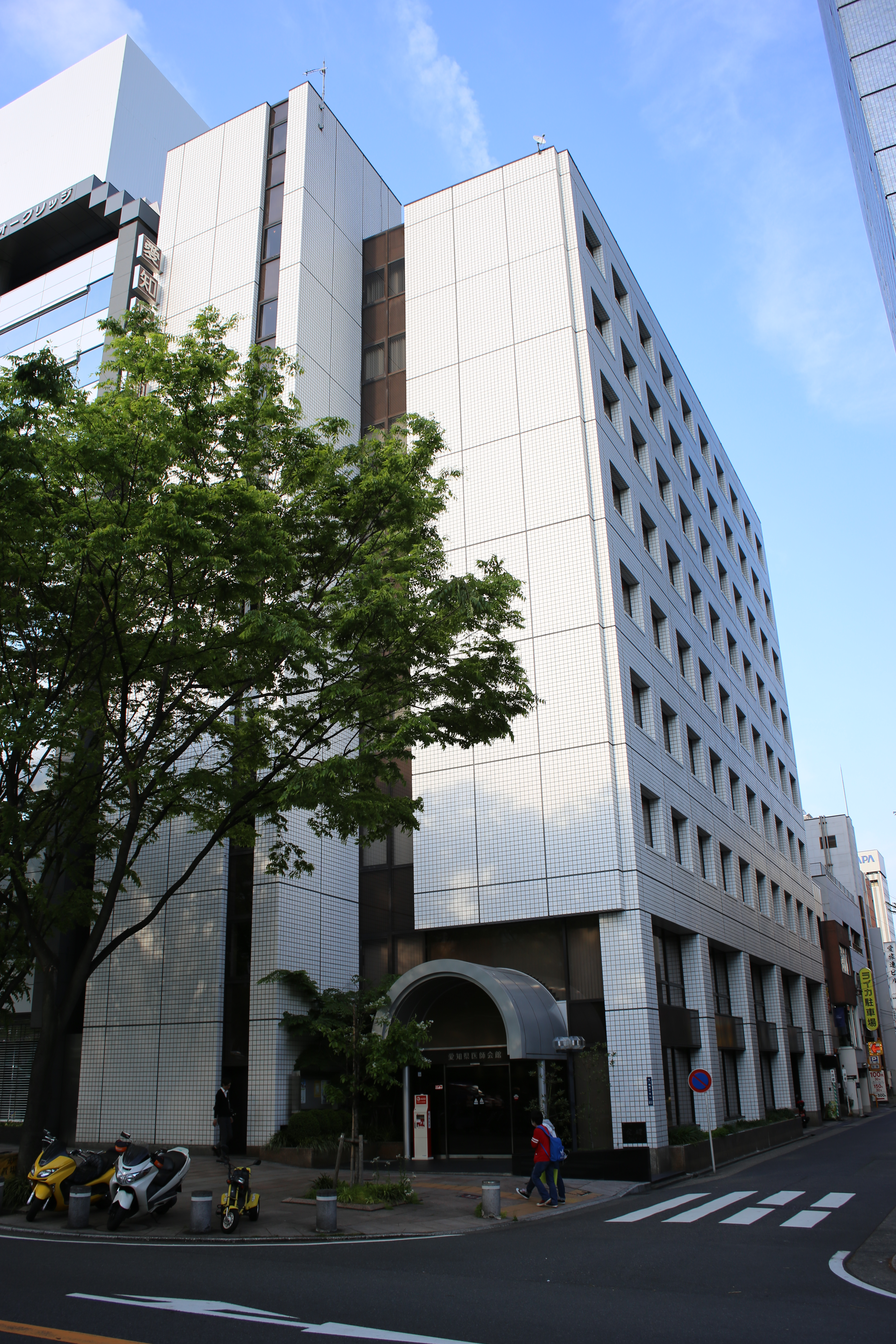 名古屋市中区栄四丁目の愛知県医師会を西側公道南側より撮影